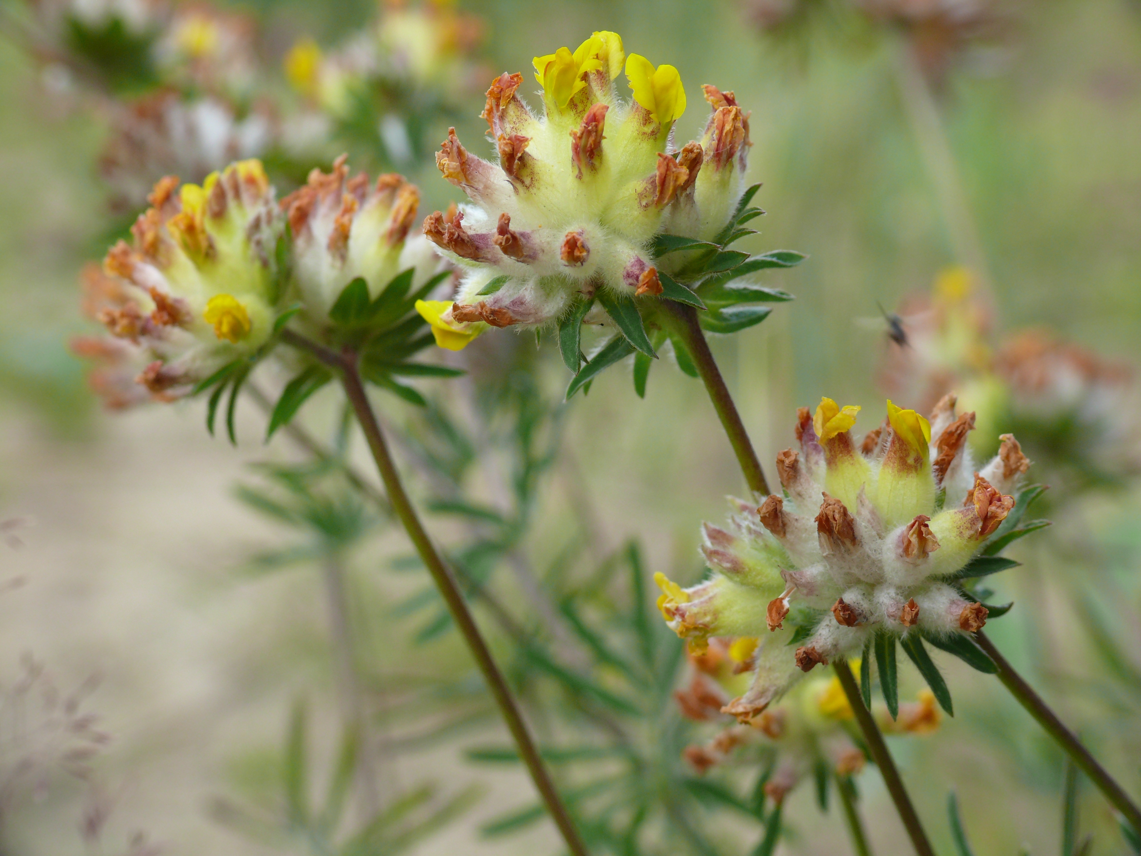 Anthyllis vulneraria